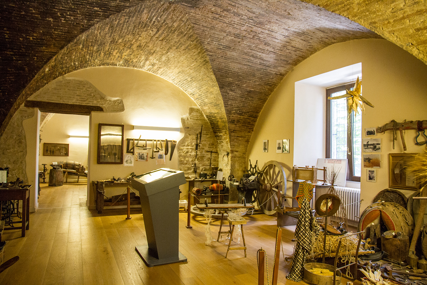 Museo del costume e della tradizione della nostra gente This is a photo of a monument which is part of cultural heritage of Italy.